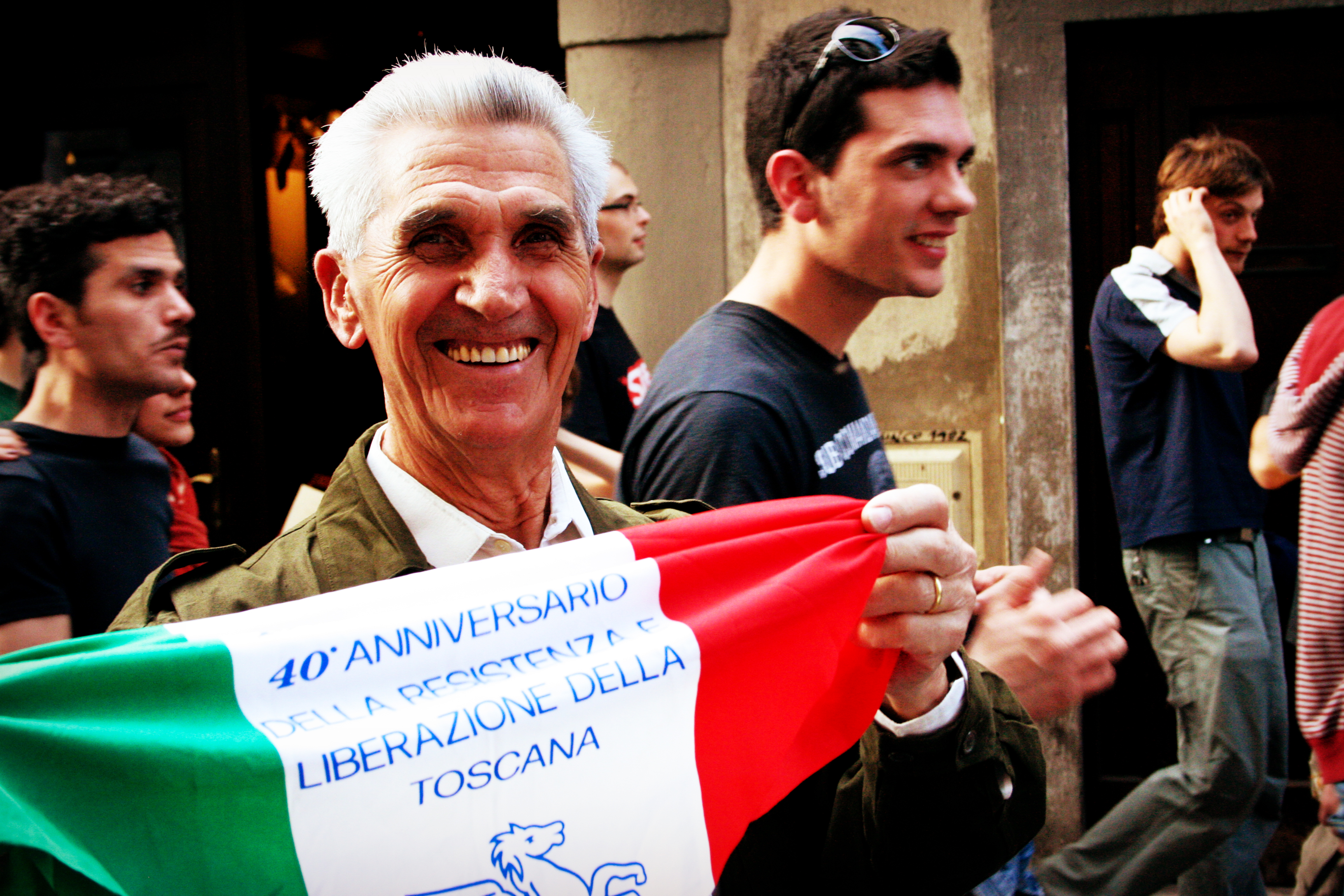 Festa della Liberazione